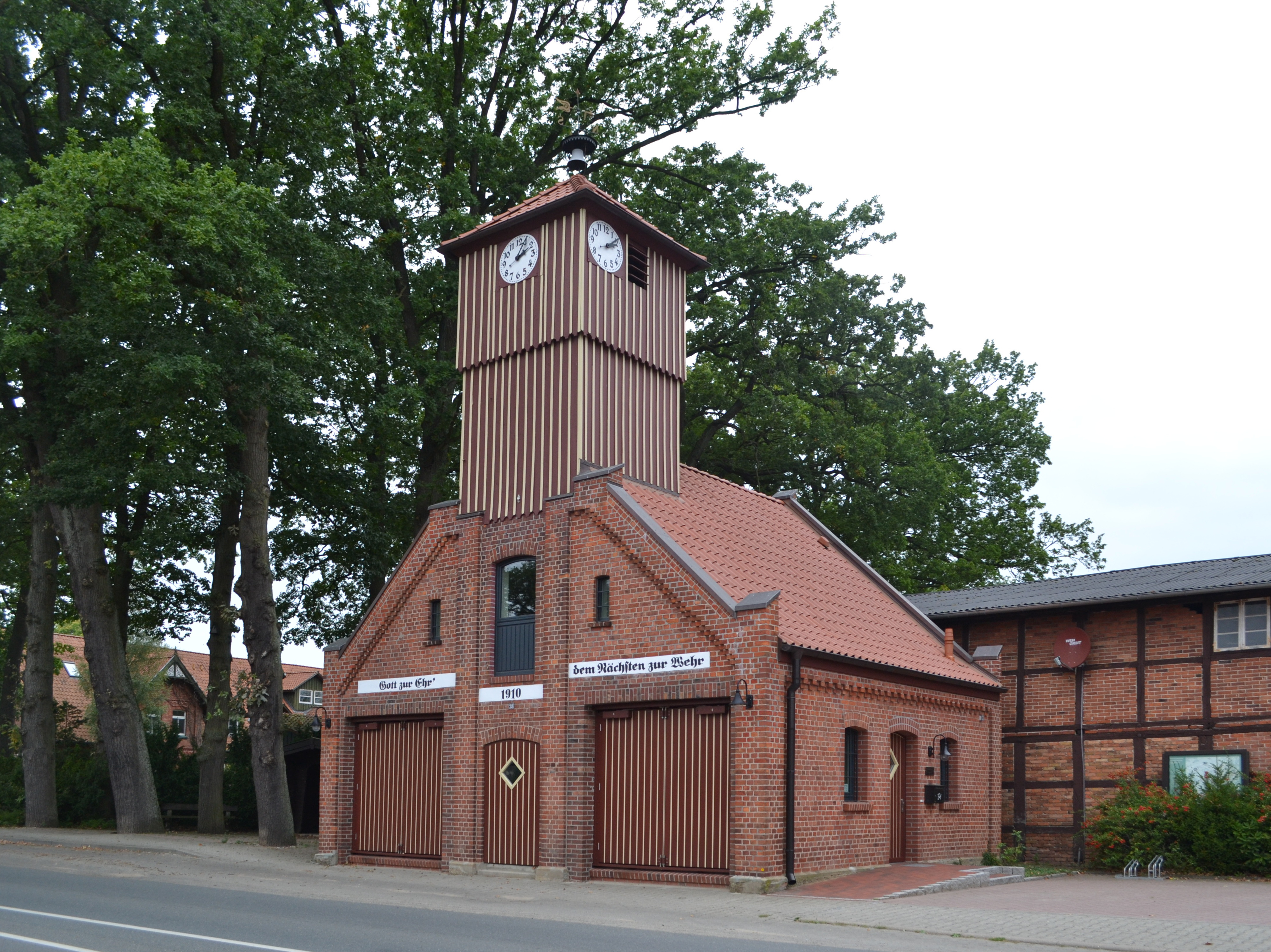 Feuerwehrhaus mit Schlauchturm in Toppenstedt